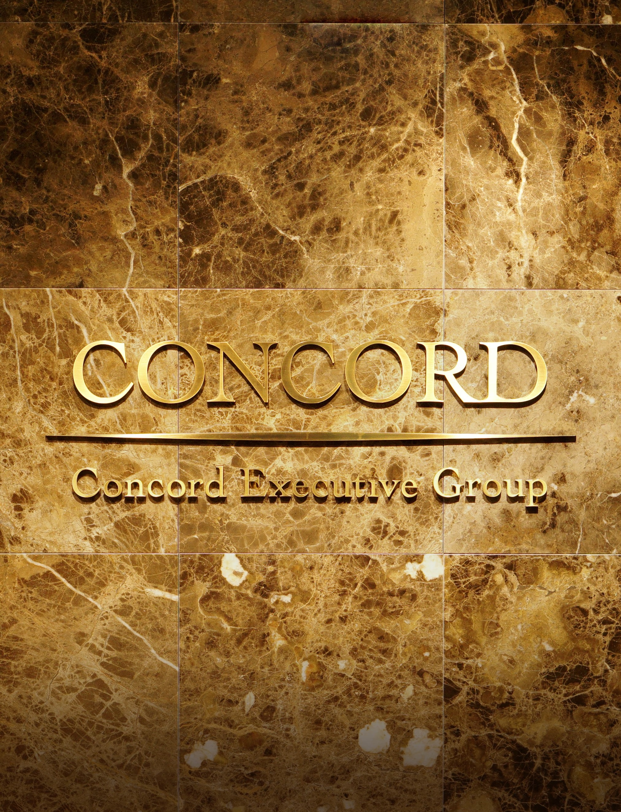 コンコードエグゼクティブグループのエントランスロゴ。2018年3月撮影。